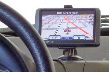 Foto de un Navegador Satelital linea automotor estandar